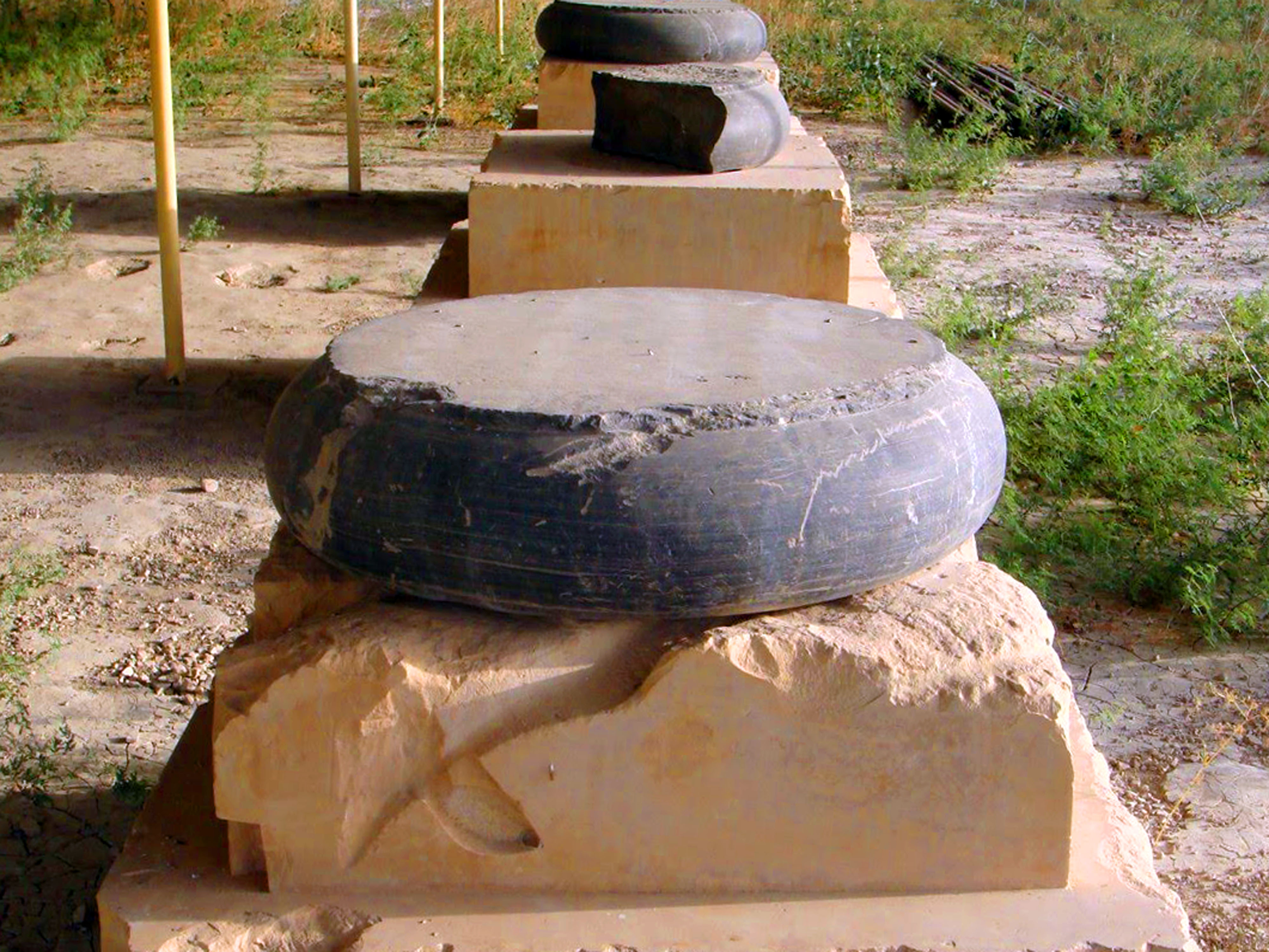 کاخ کوروش